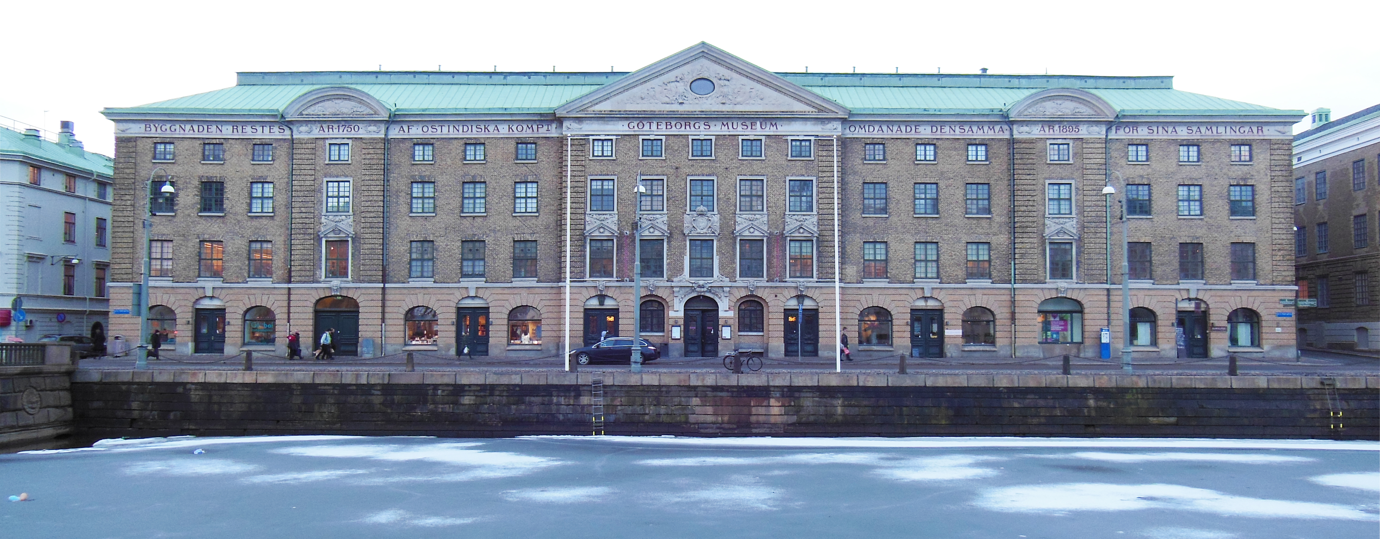 Stadsmuseet, Göteborg 2013